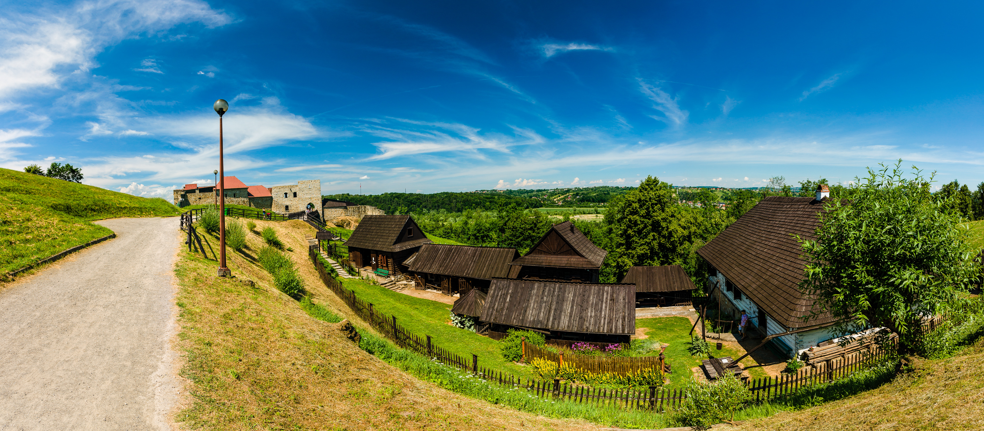 Panorama na skansen w Dobczycach z widocznym w tle zamkiem